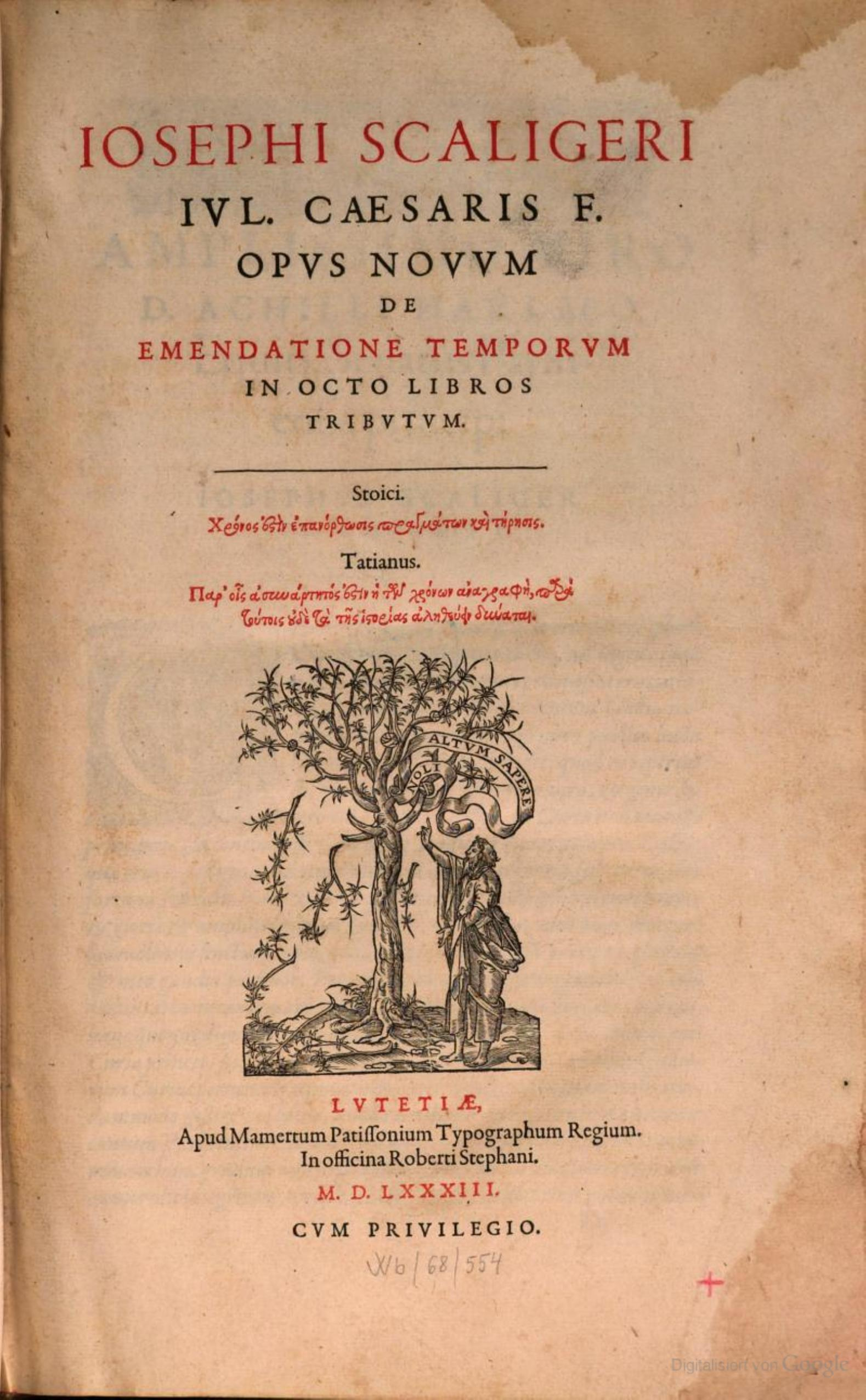 Joseph Justus Scaliger, De emendatione temporum (1583): Titelseite des Exemplars der Bayerischen Staatsbibliothek